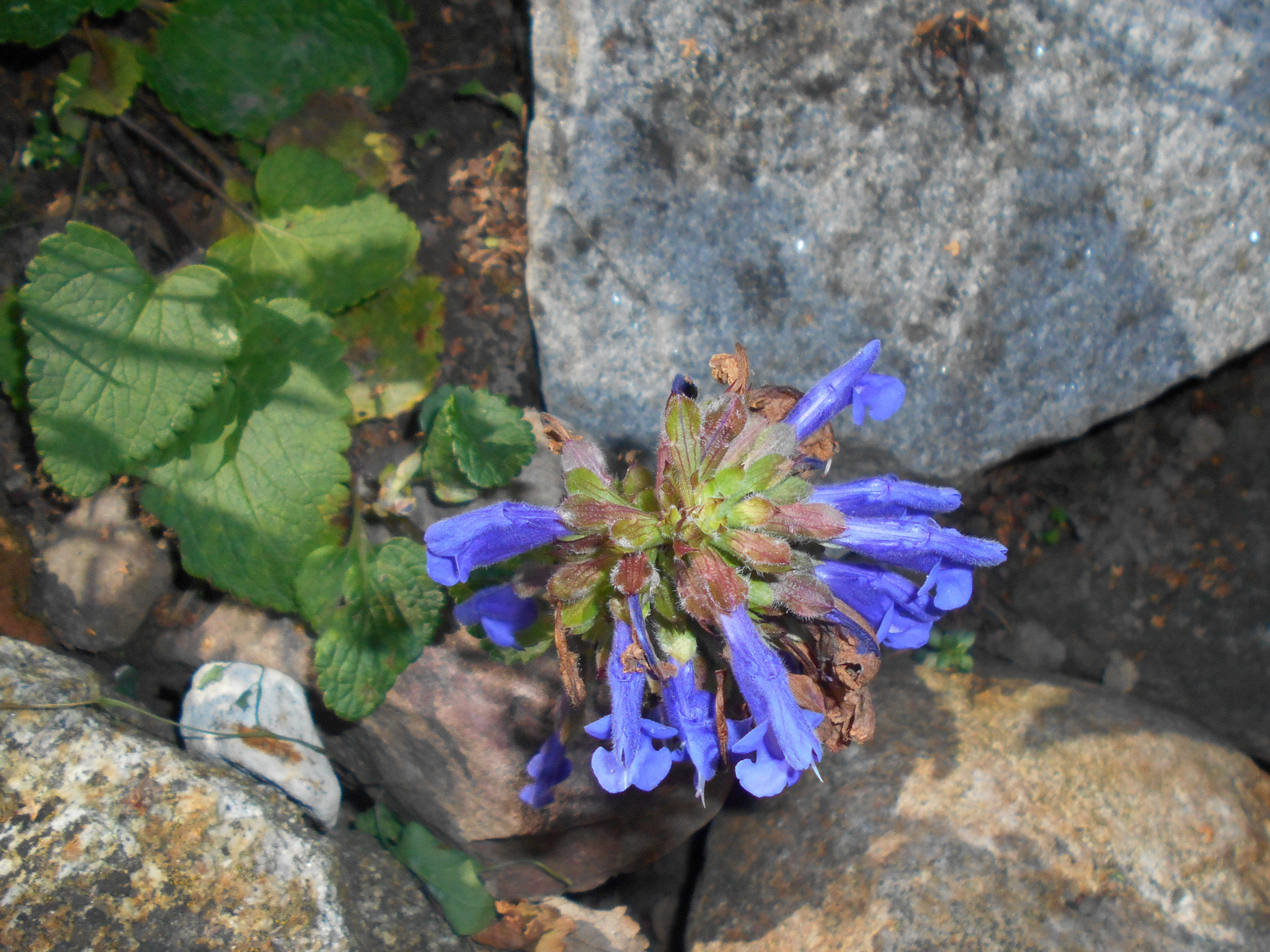 Pszczelnik skalny (Dracocephalum rupestre), Ogród Botaniczny UMCS w Lublinie.